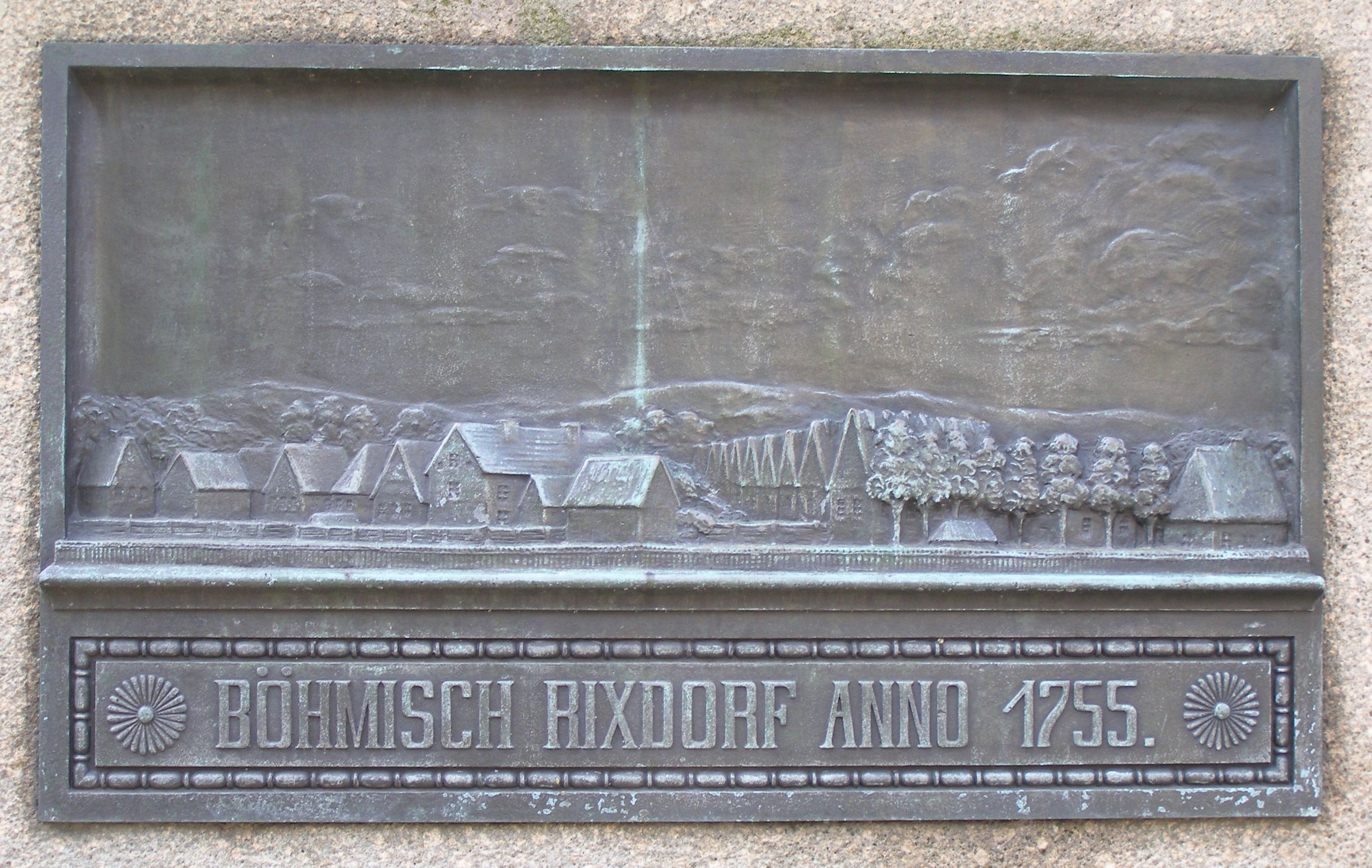 Böhmisch Rixdorf (Berlin), Tafel an der Statue von Friedrich Wilhelm I. (*1688-†1740, König von Preußen)